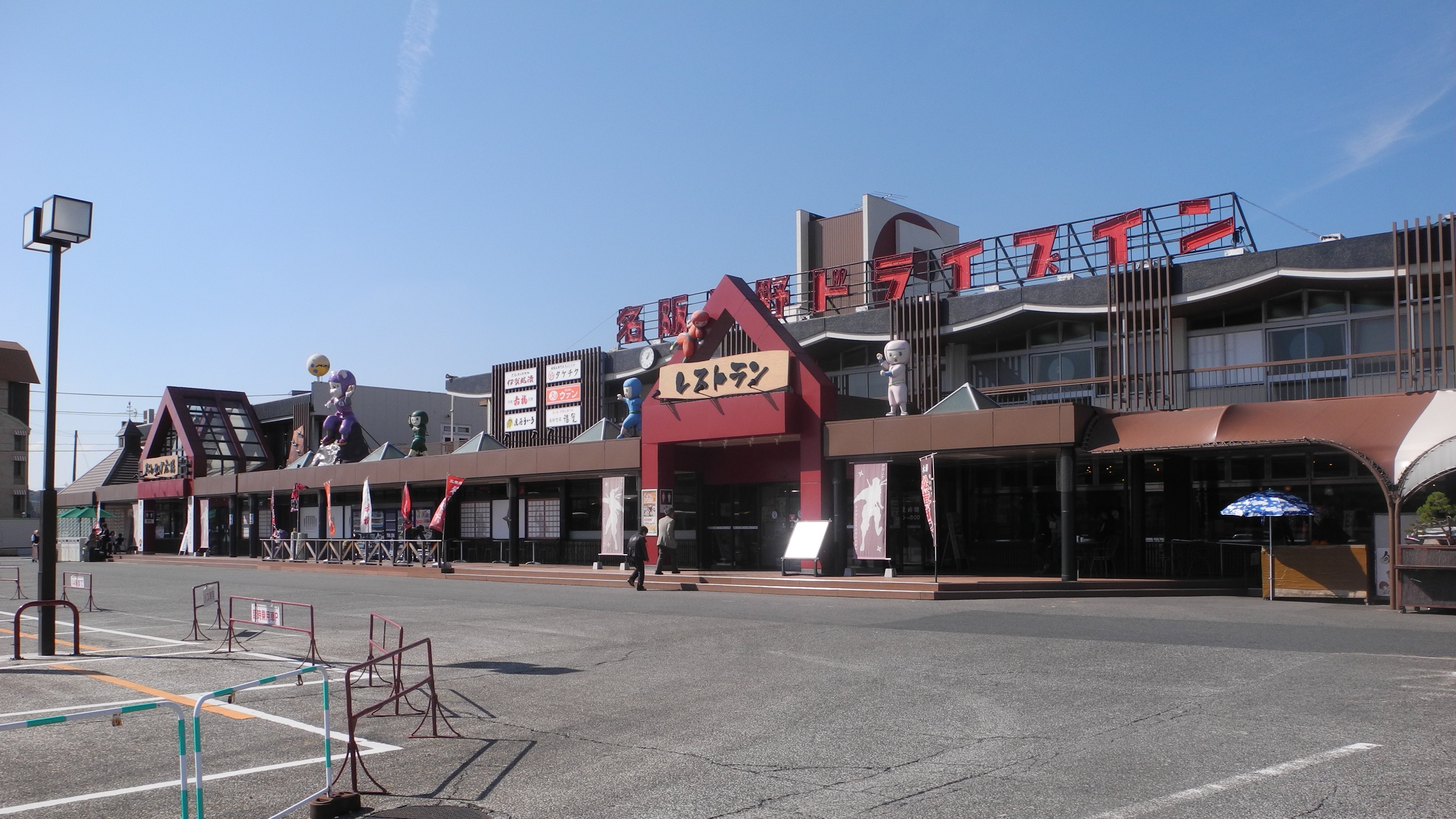 名阪上野ドライブイン (三重県伊賀市)